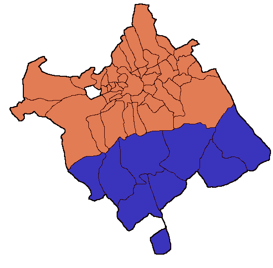 Campo de Murcia, parte del municipio de Murcia perteneciente a la comarca geográfica y agraria del Campo de Cartagena. Se encuentra situado al sur de la Sierra de Carrascoy y sus aguas pluviales desembocan en el Mar Menor.